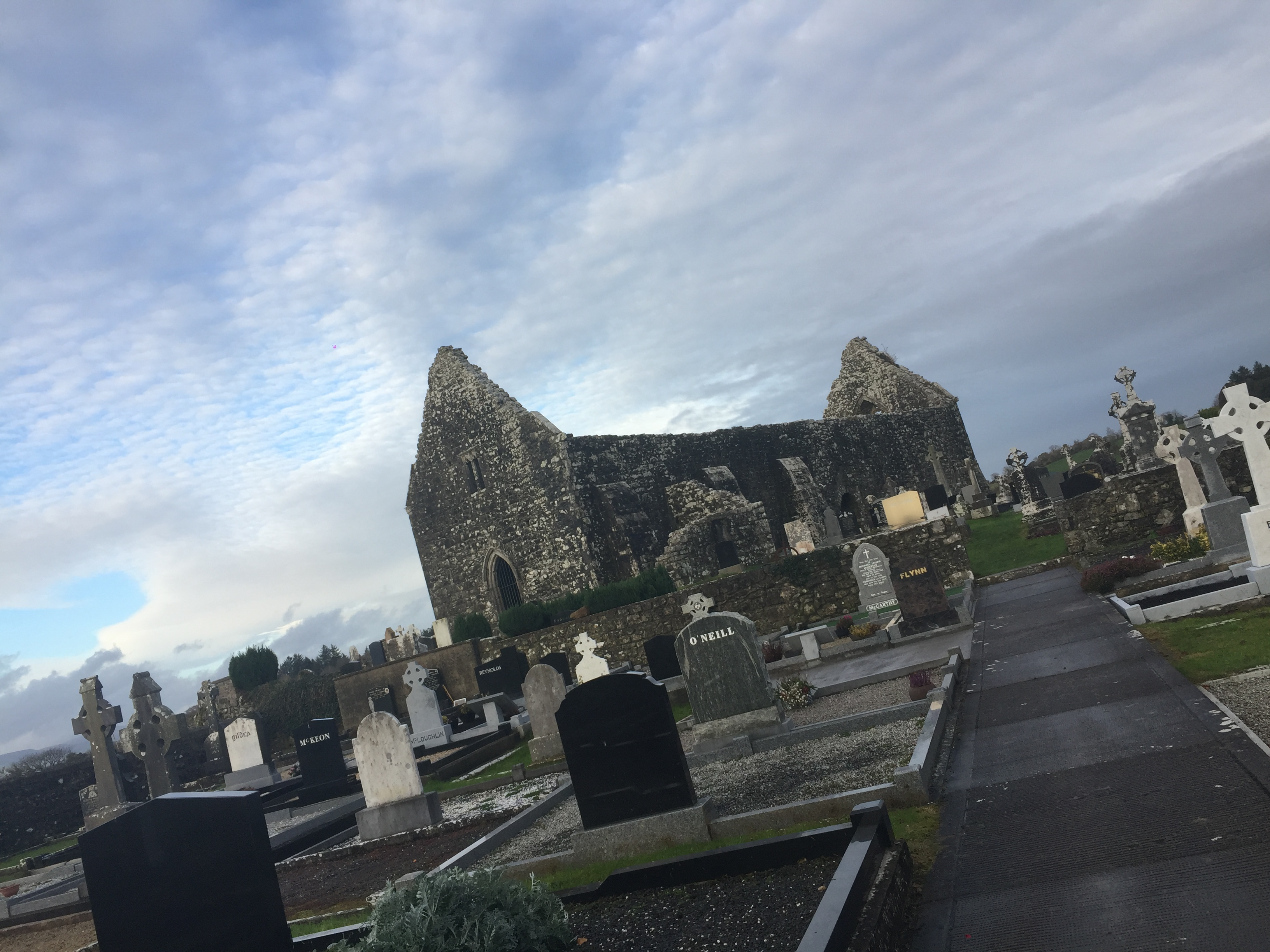 Seo é an Mhainistir